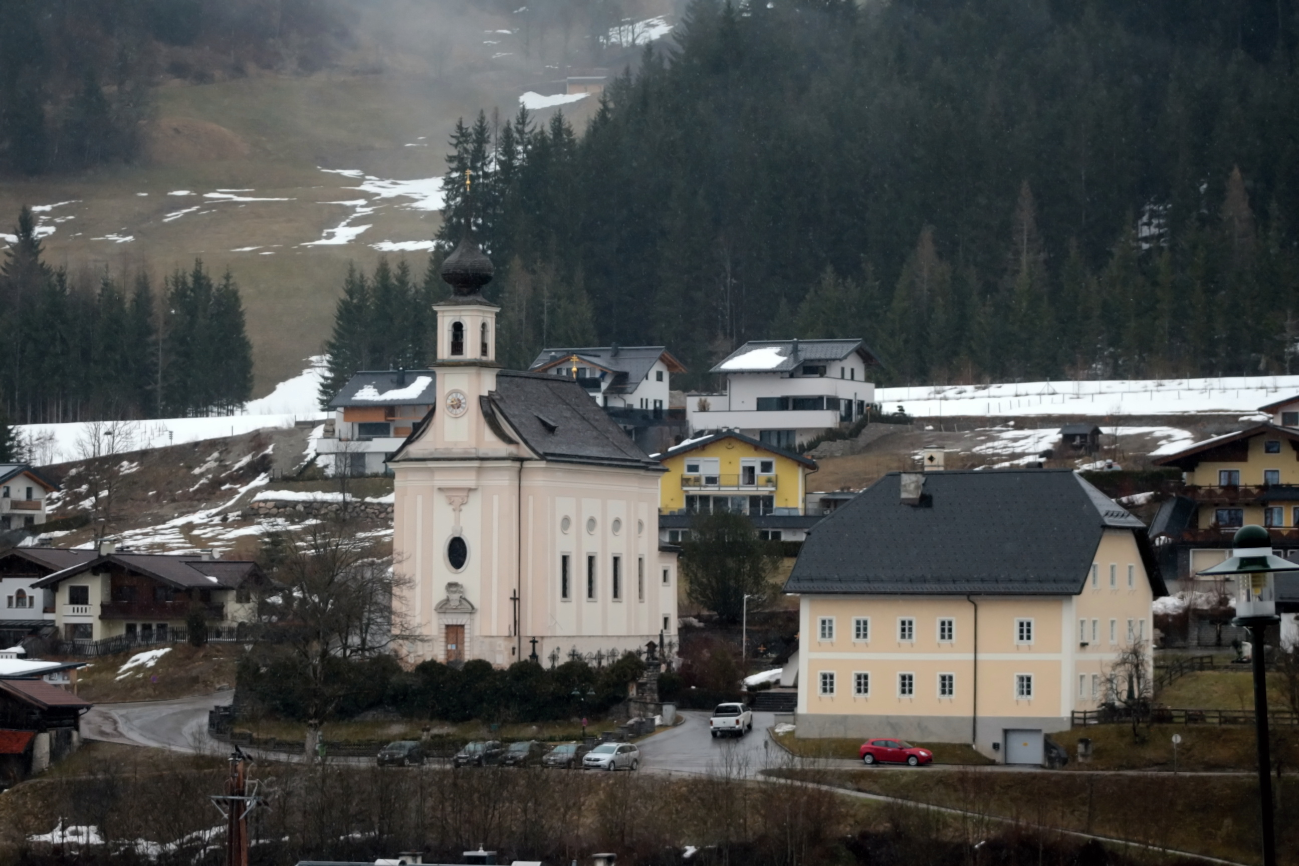 Flachau